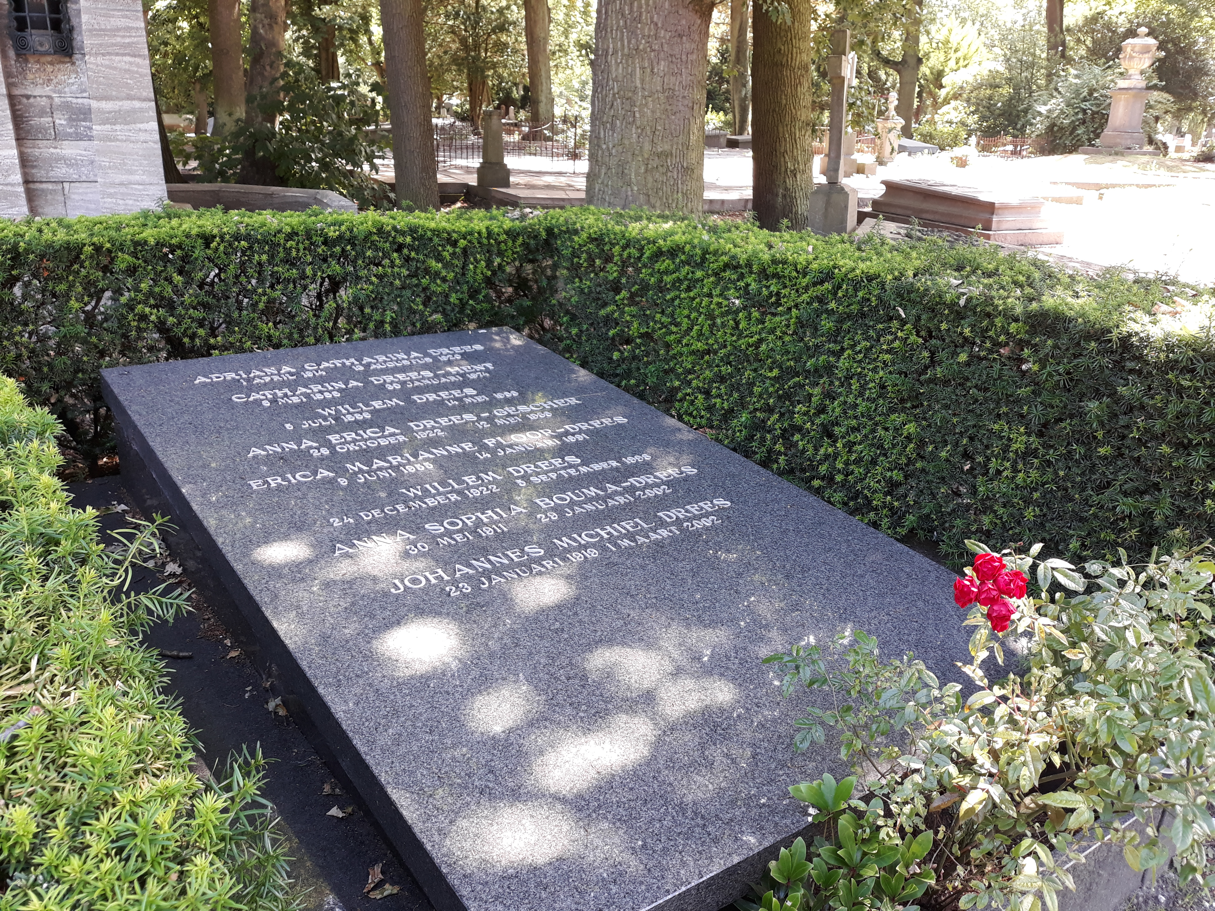 Das Grab des niederlänischen Politikers Willem Drees, langjähriger Ministerpräsident, im Familiengrab Oude Eik en Duin in Den Haag; auch Grab seines Sohnes Willem jr., niederländischer Politiker.